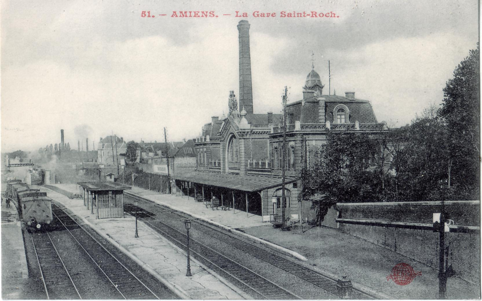 Carte postale ancienne éditée par Globe (?) N°51 Amiens - La Gare Saint-Roch